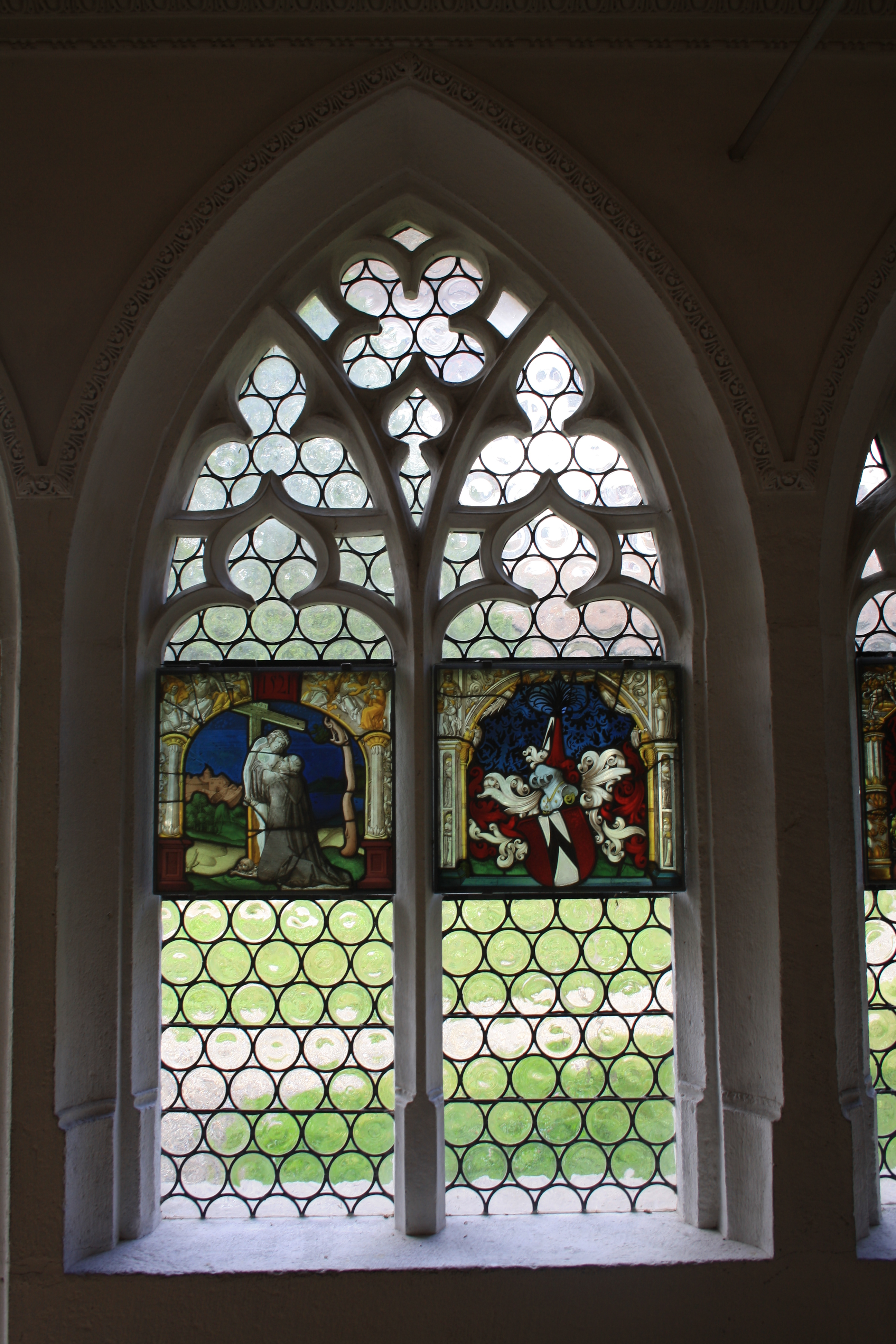 Fensterbögen im Westarm des Kreuzgangs (Kloster Wettingen)